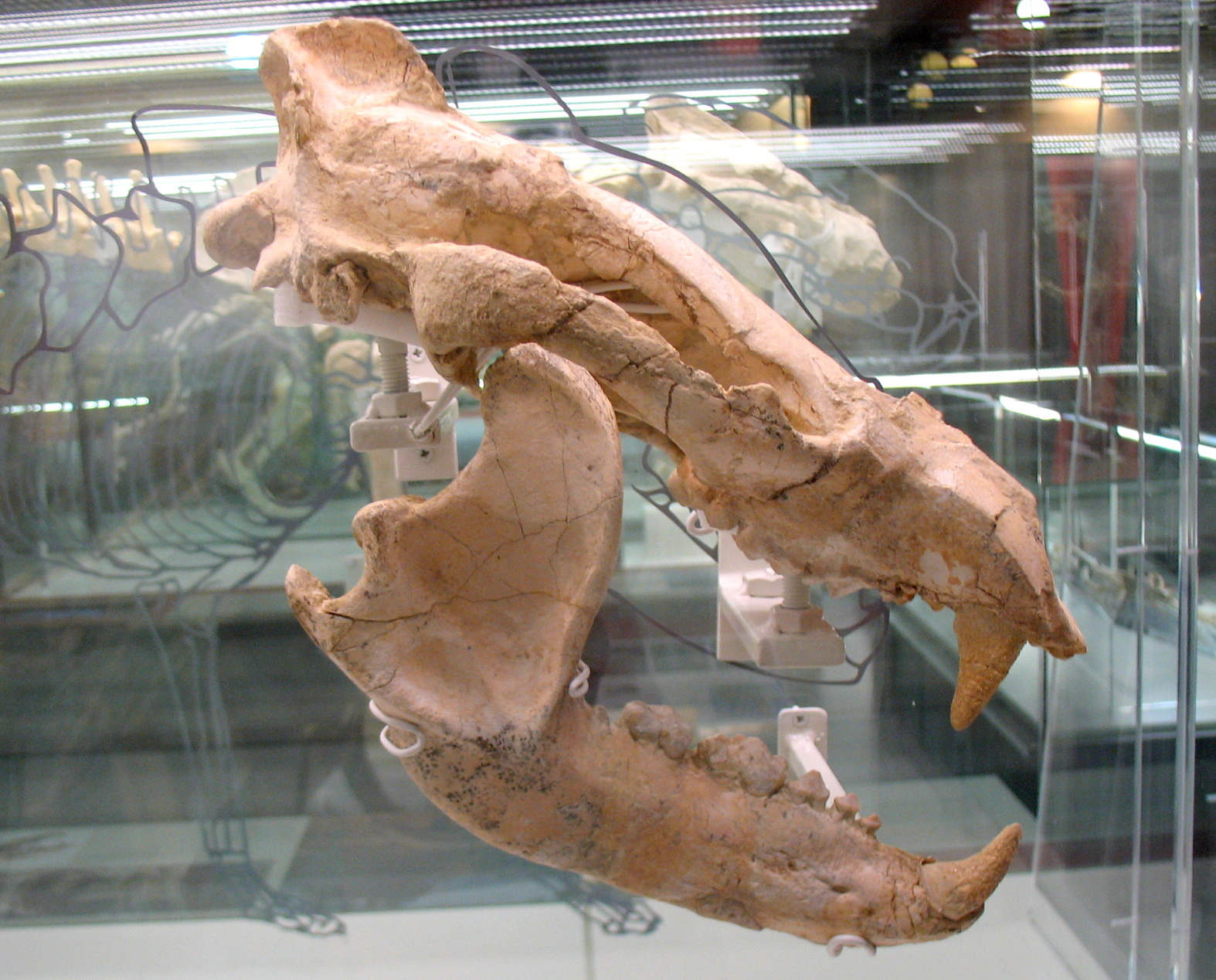 Cráneo de Indarctos arctoides del yacimiento de Batallones 3, Torrejón de Velasco, Madrid, España (caninos y mandíbula son réplicas de otros fósiles aislados del yacimiento). Exposición temporal "La colina de los tigres dientes de sable. Los yacimientos miocenos del cerro de los Batallones (Torrejón de Velasco, Comunidad de Madrid)" en el Museo Arqueológico Regional (MAR), Alcalá de Henares (Madrid)